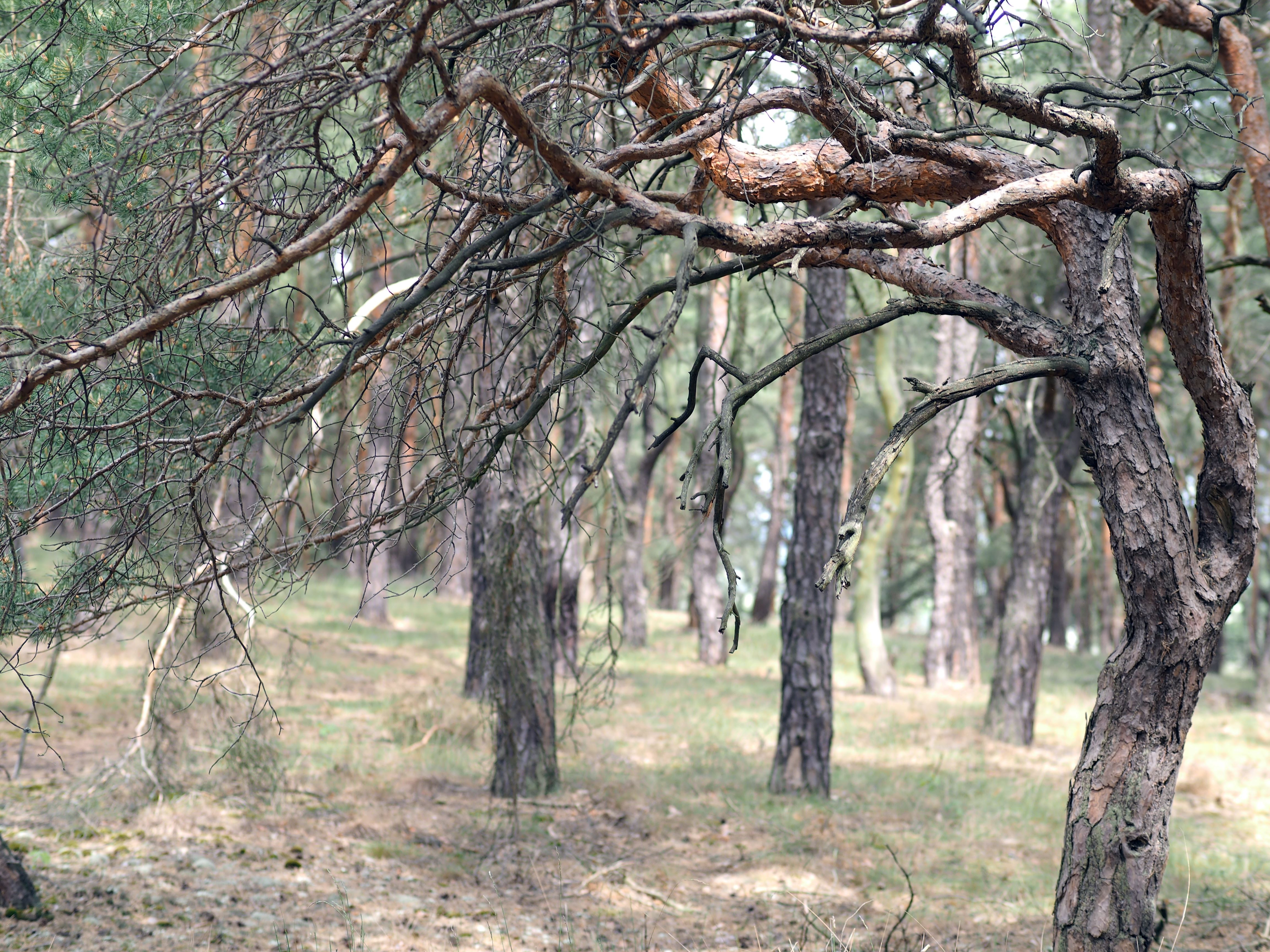 Naturpark Nuthe-Nieplitz Knorrige Kiefer mit Kiefernwald in den Glauer Bergen